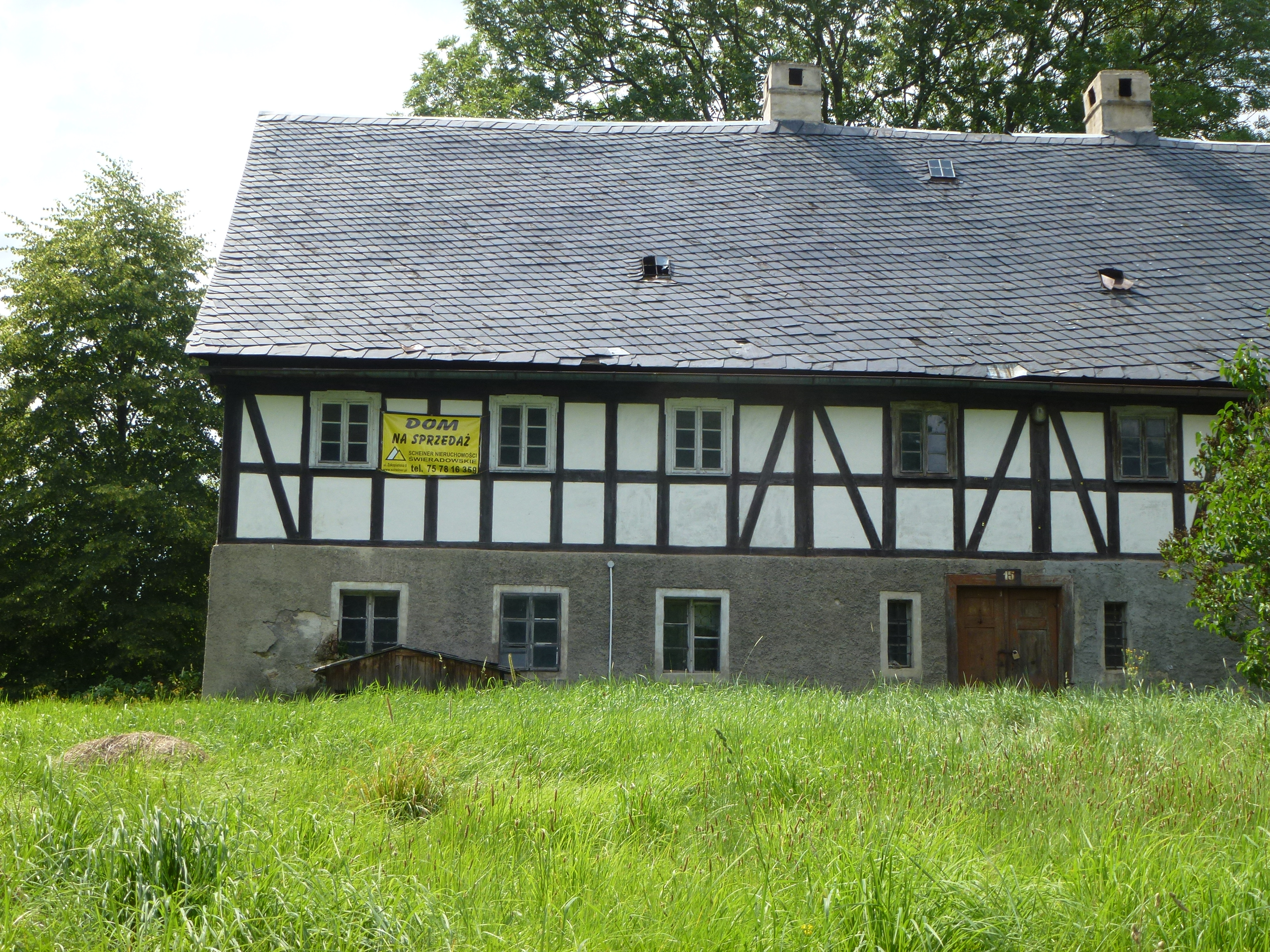 Gebäude Nr. 15 in Karlsberg am Queis.